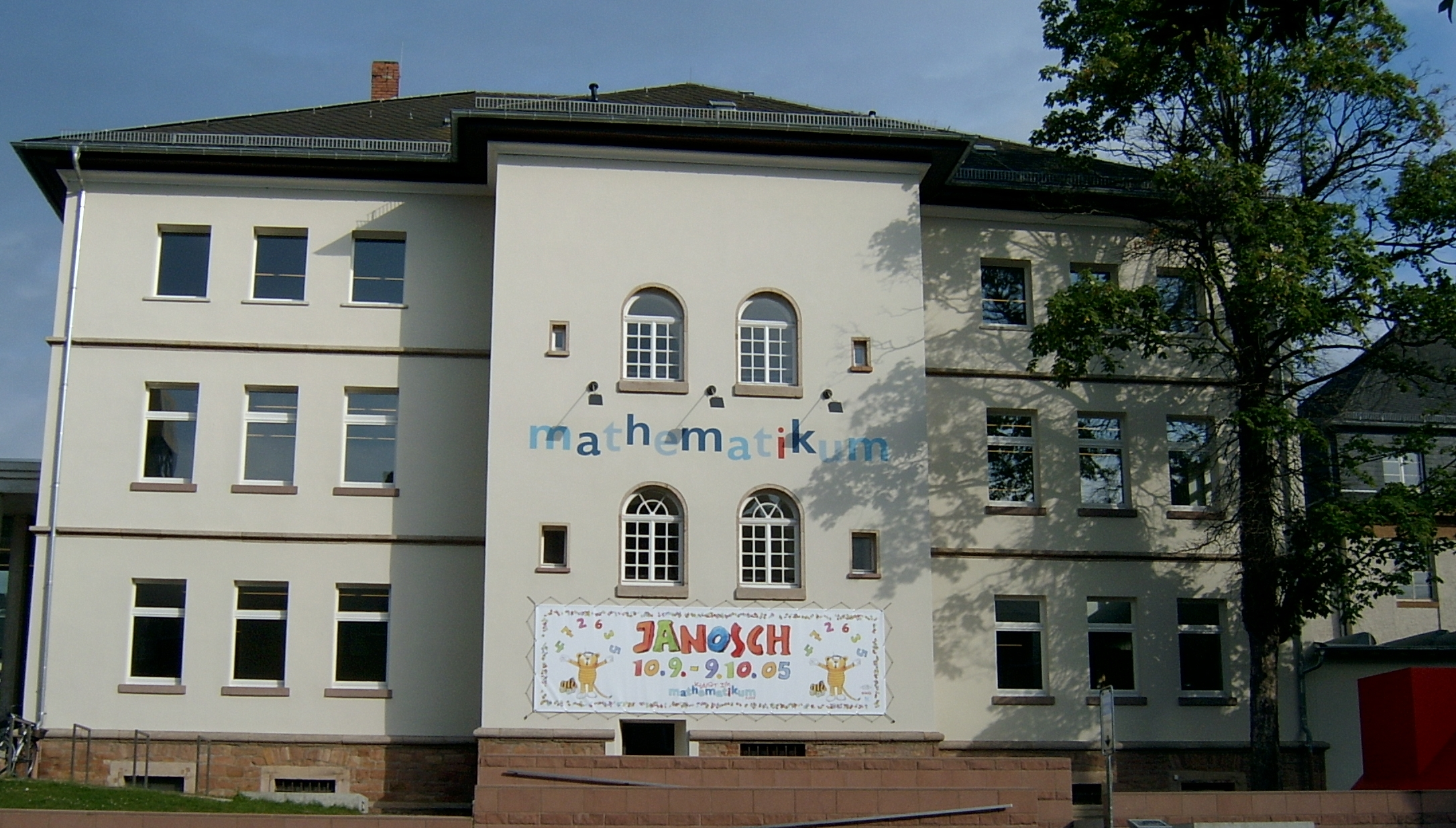 Museum Mathematikum in Gießen